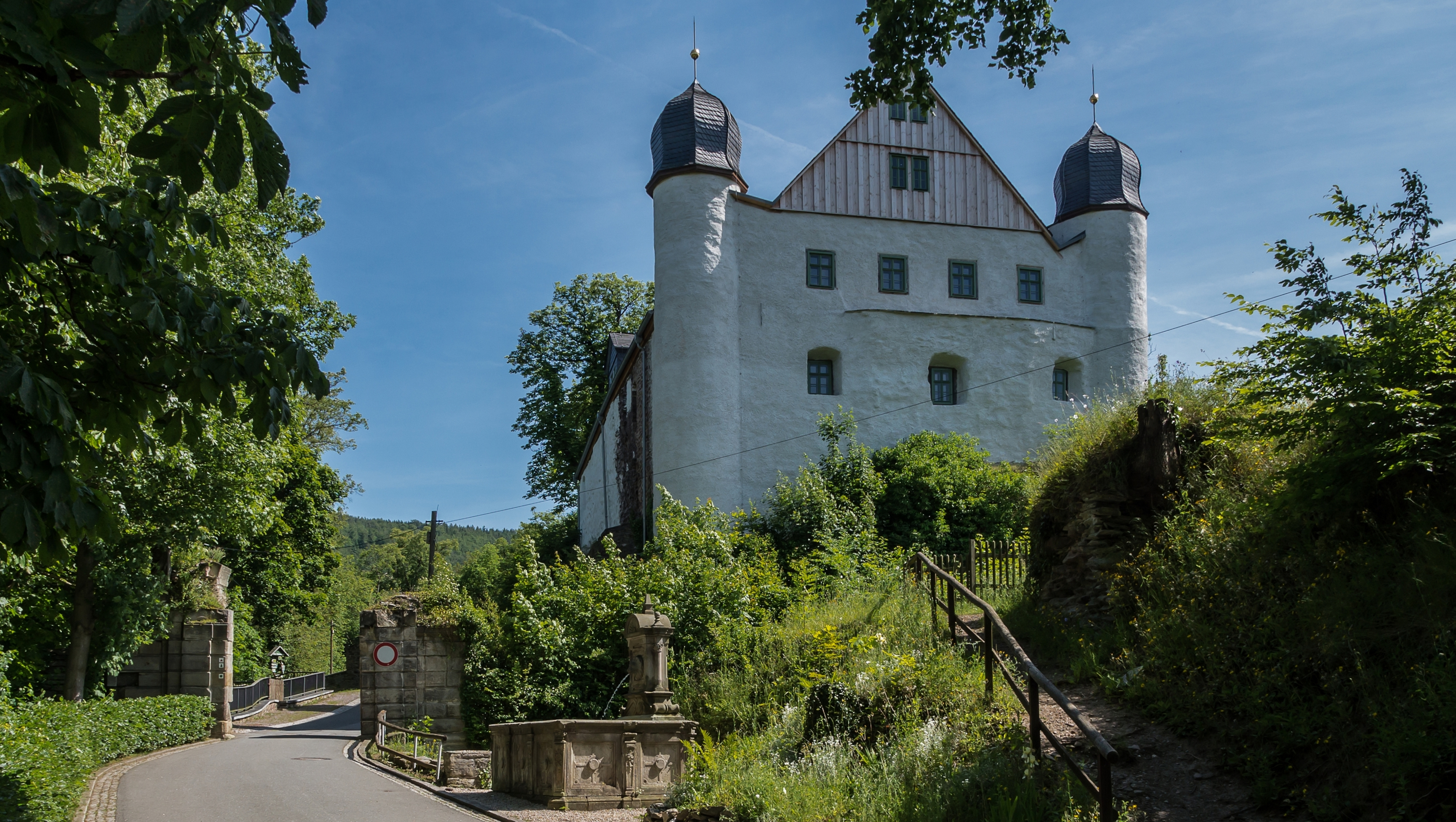 Denkmalgeschützte Teilfläche Schloss Schwarzburg 1